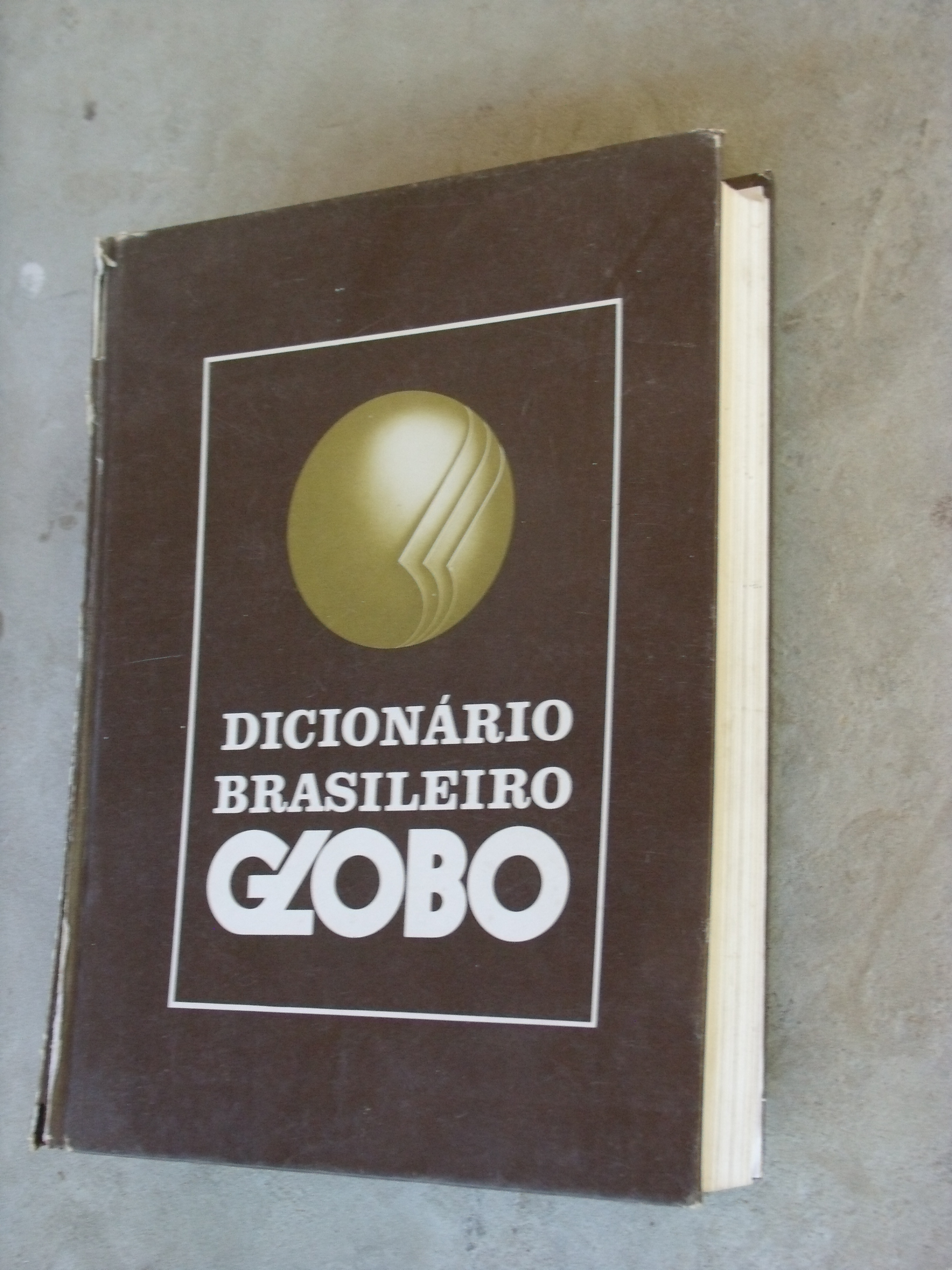 Imagem do livro Dicionário Brasileiro Globo. O mesmo é pertencente ao acervo da autoria desta imagem.